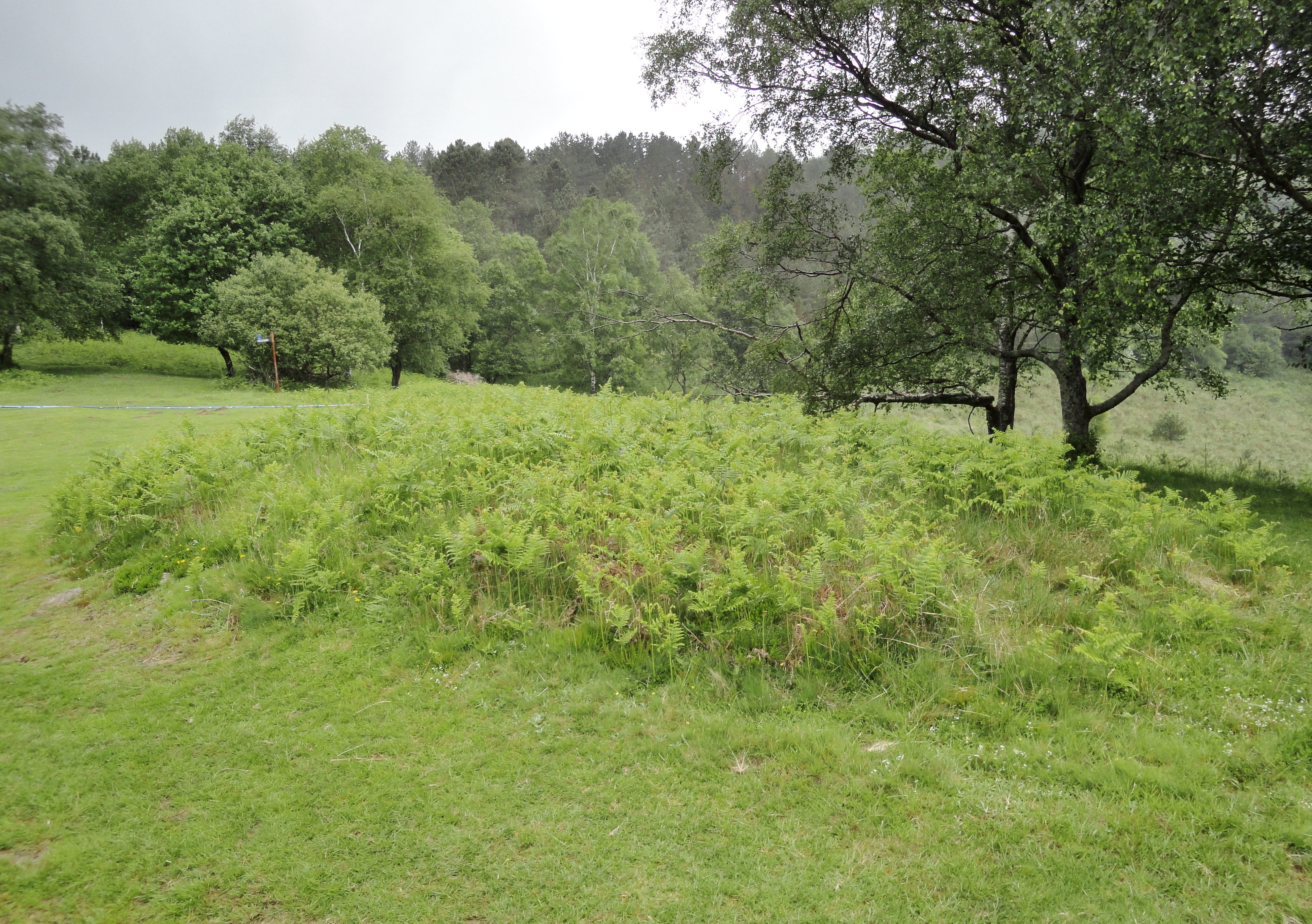 Itxurain tumulua - Alkiza